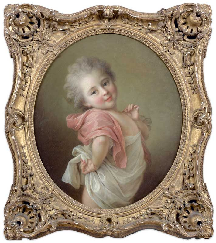 François Hubert Drouais (1727-75) : Petite Fille relevant sa robe (1770).